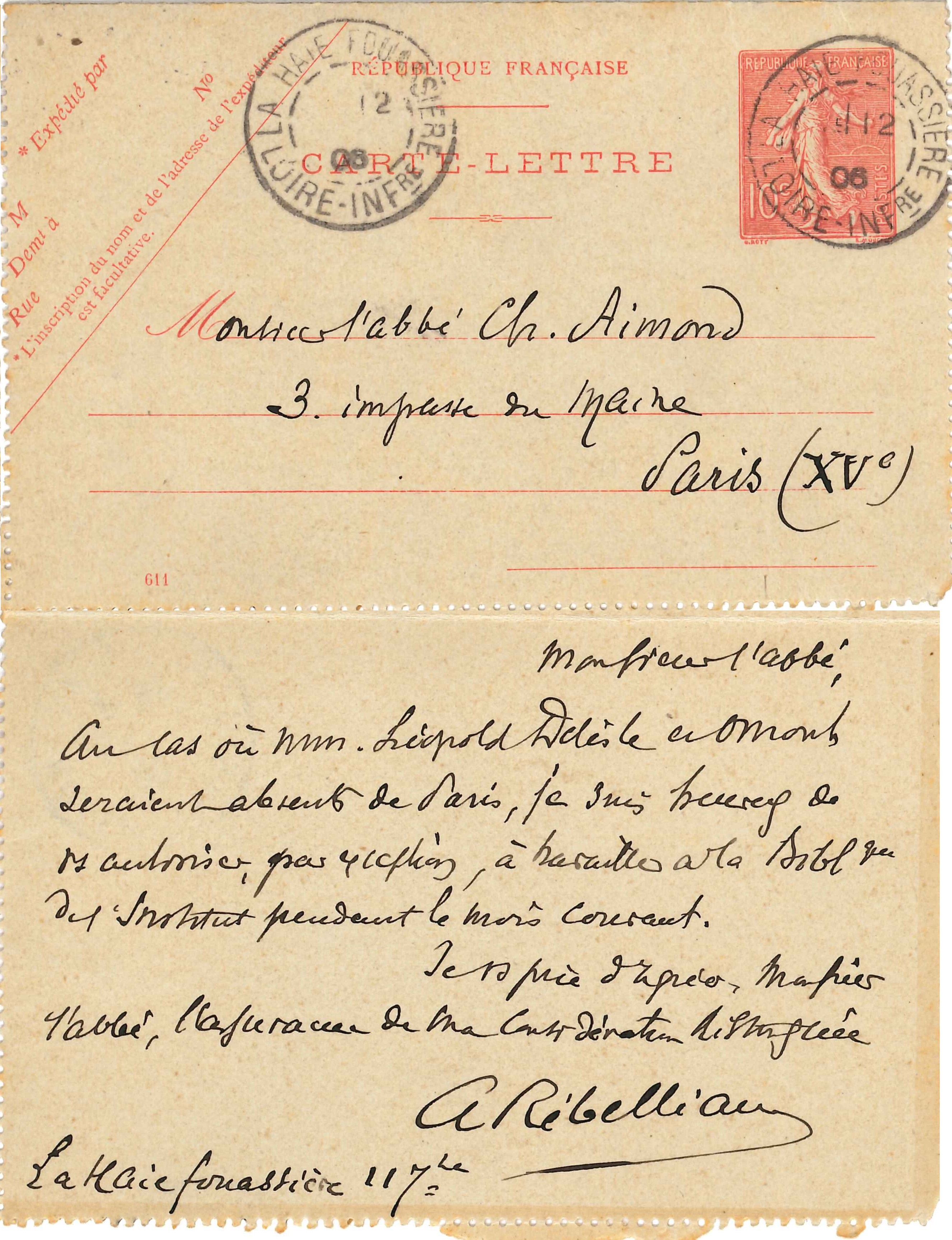 Carte d’Alfred Rébelliau à l’Abbé Charles Aimond, futur Monseigneur Aimond. Source : Archives Jean Grosdidier de Matons (1926–2017), sans doute par sa nièce Jeanne Buitge qui accompagna Mgr Aimond au cours de sa vie.